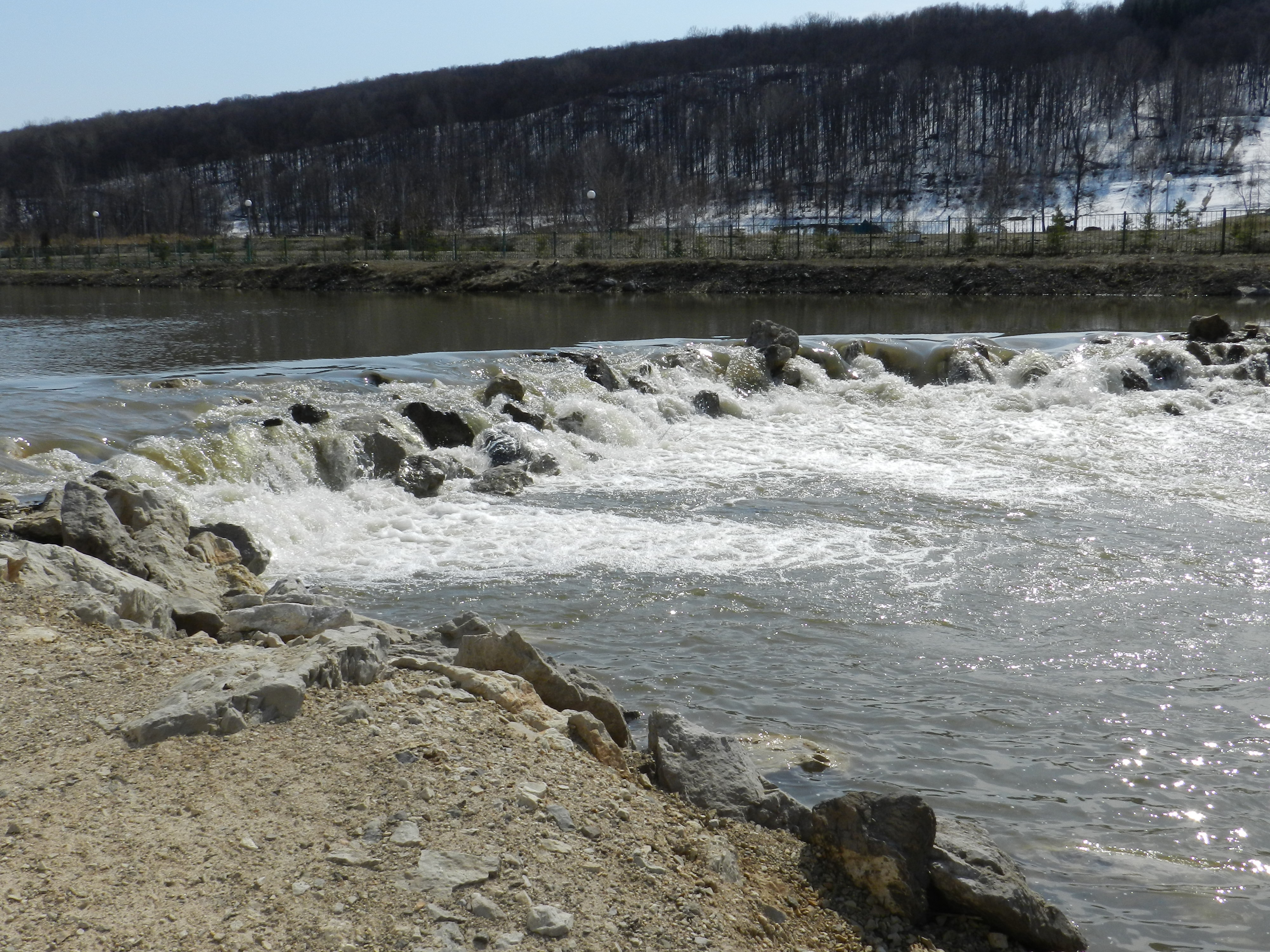 Красноусольские минеральные источники: Гафурийский район, Башкортостан This image is related to the protected area of Russia number 0210111